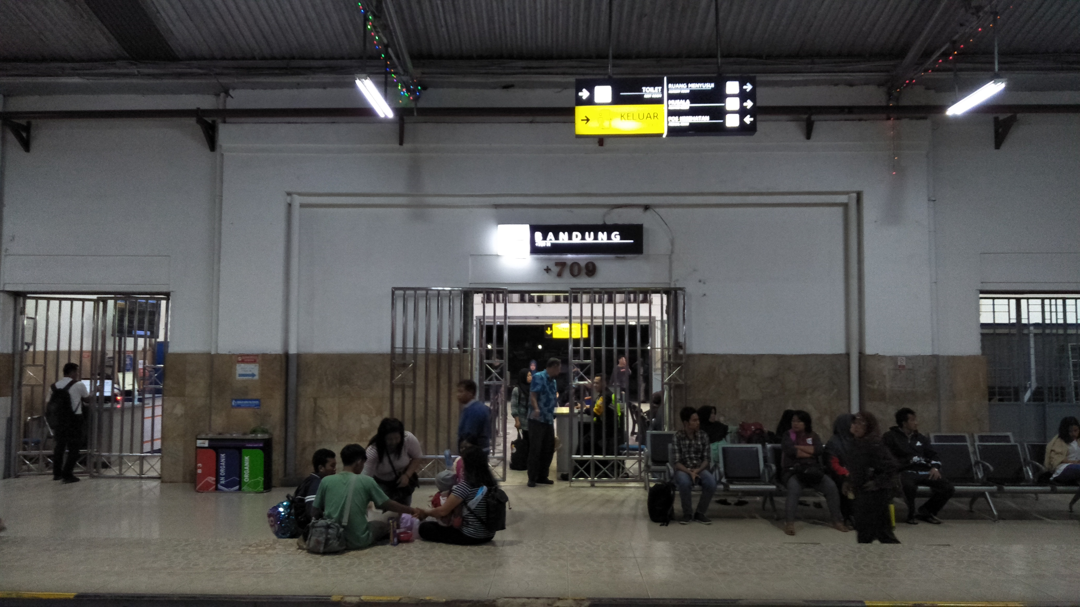 Stasiun Bandung dalam